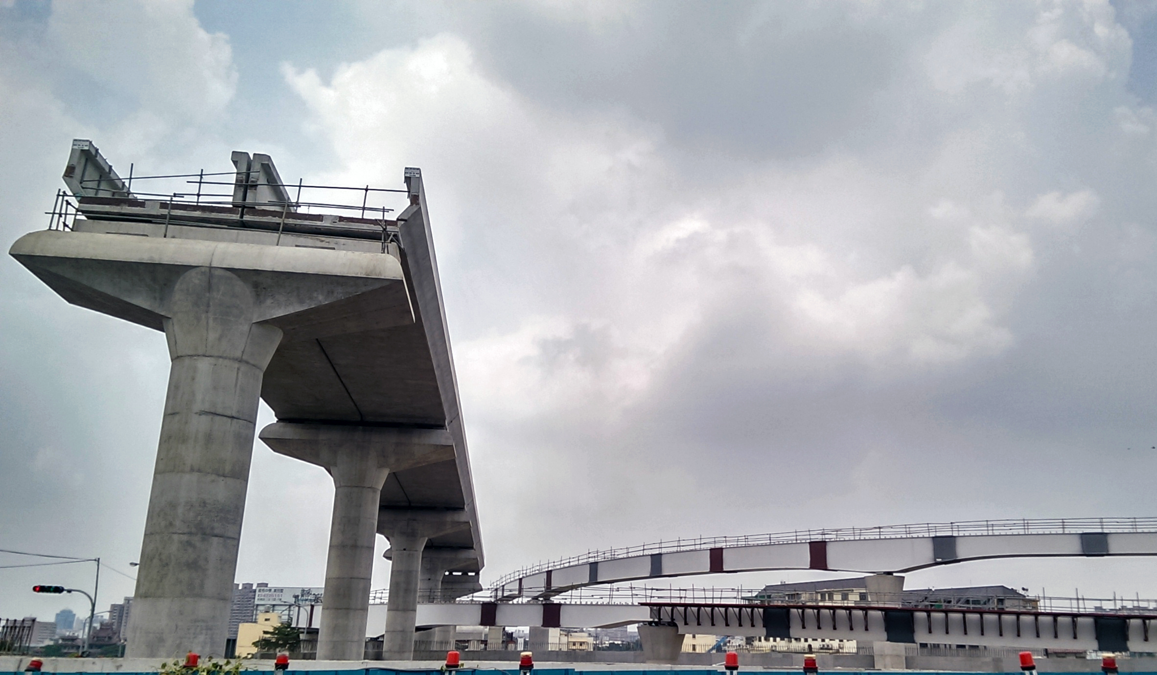 中文（台灣）: 台中捷運綠線北屯機廠2014年8月工程情況，左側高架橋為未來延伸至大坑的預留工程